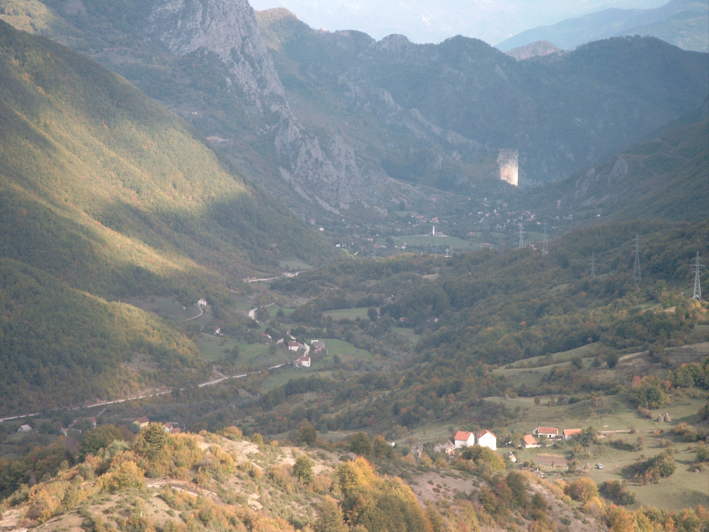 Doljani kod Jablanice fotografija pogled s Obruča